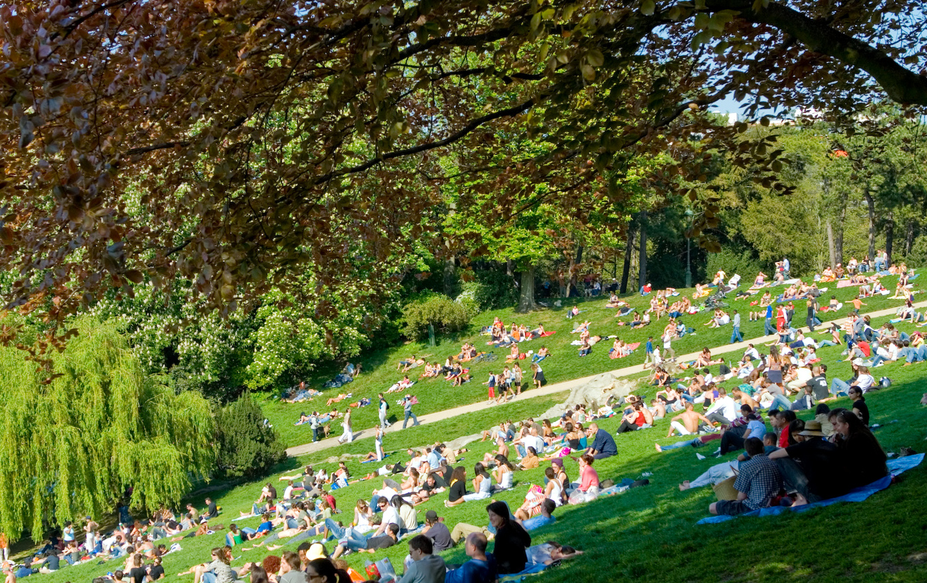 Parc des Buttes Chaumont, Paris